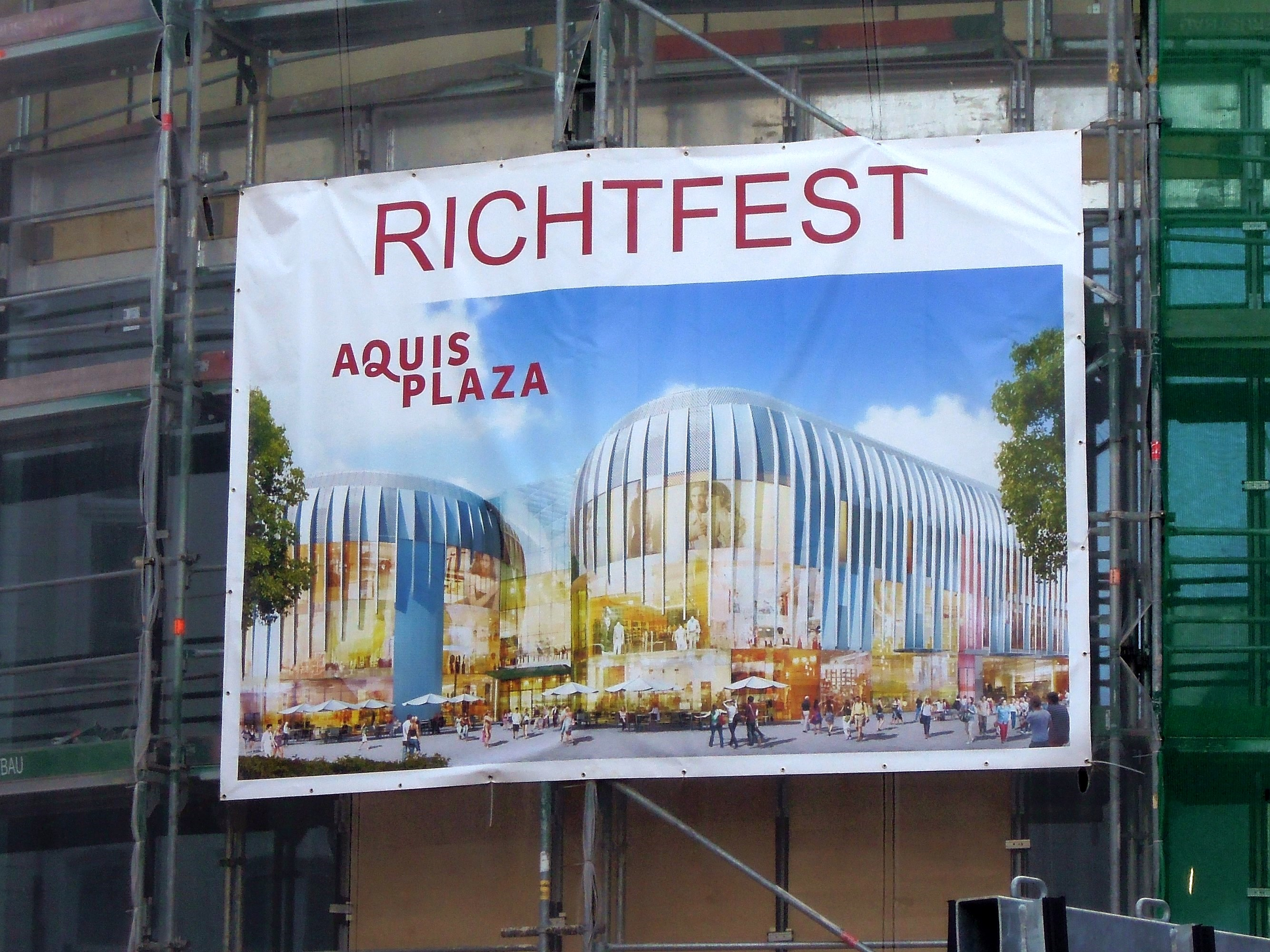 Am Kaiserplatz in Aachen entsteht das Einkaufszentrum "Aquis Plaza". Ein Blick auf die Baustelle im Januar 2015.